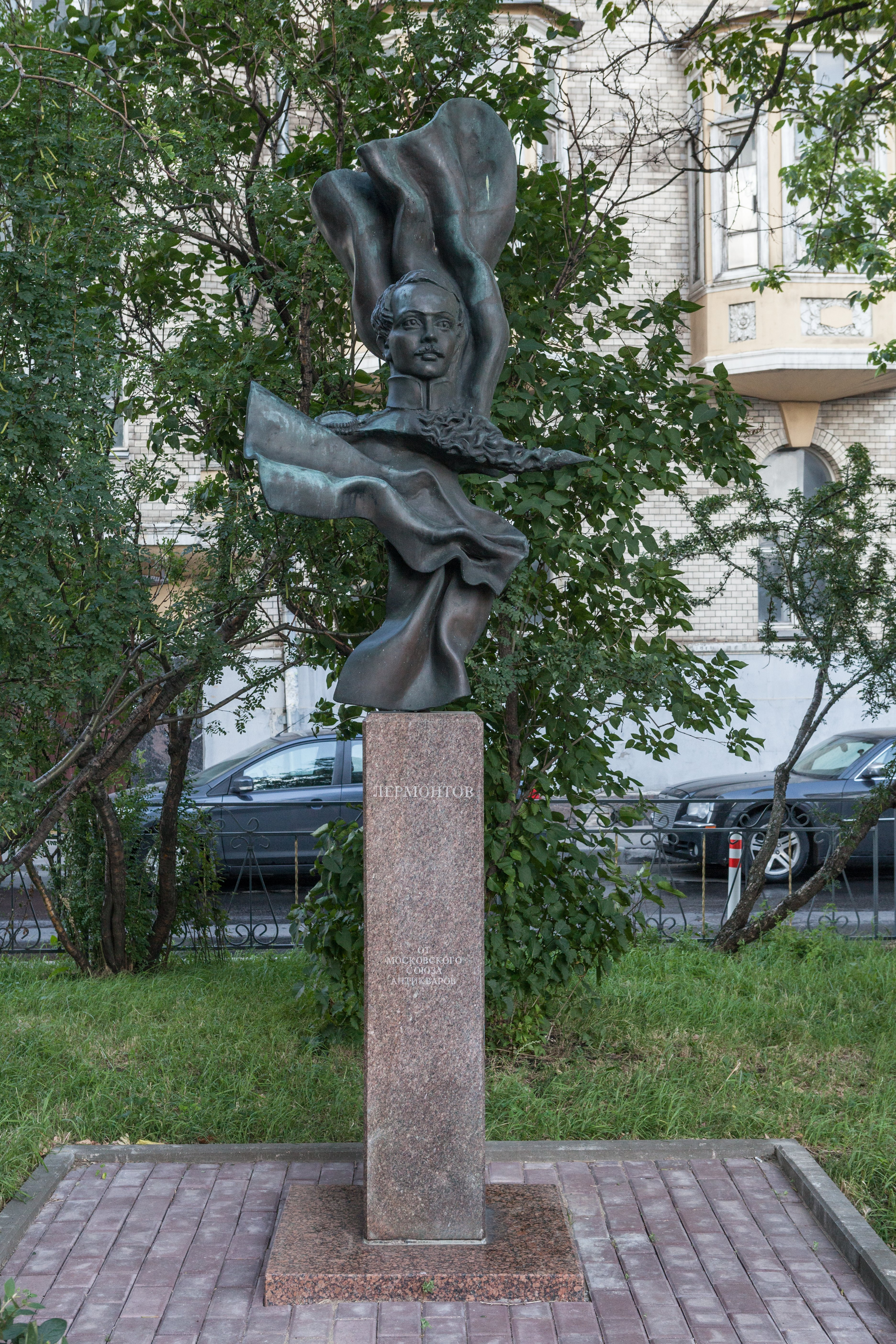 Бюст Михаилу Лермонтову, установленный в 1994 году у дома где жил поэт на Малой Молчановке, 2. Архитекторы: М. В. Посохин, З. В. Харитонова. Скульптор: А. Н. Бурганов.